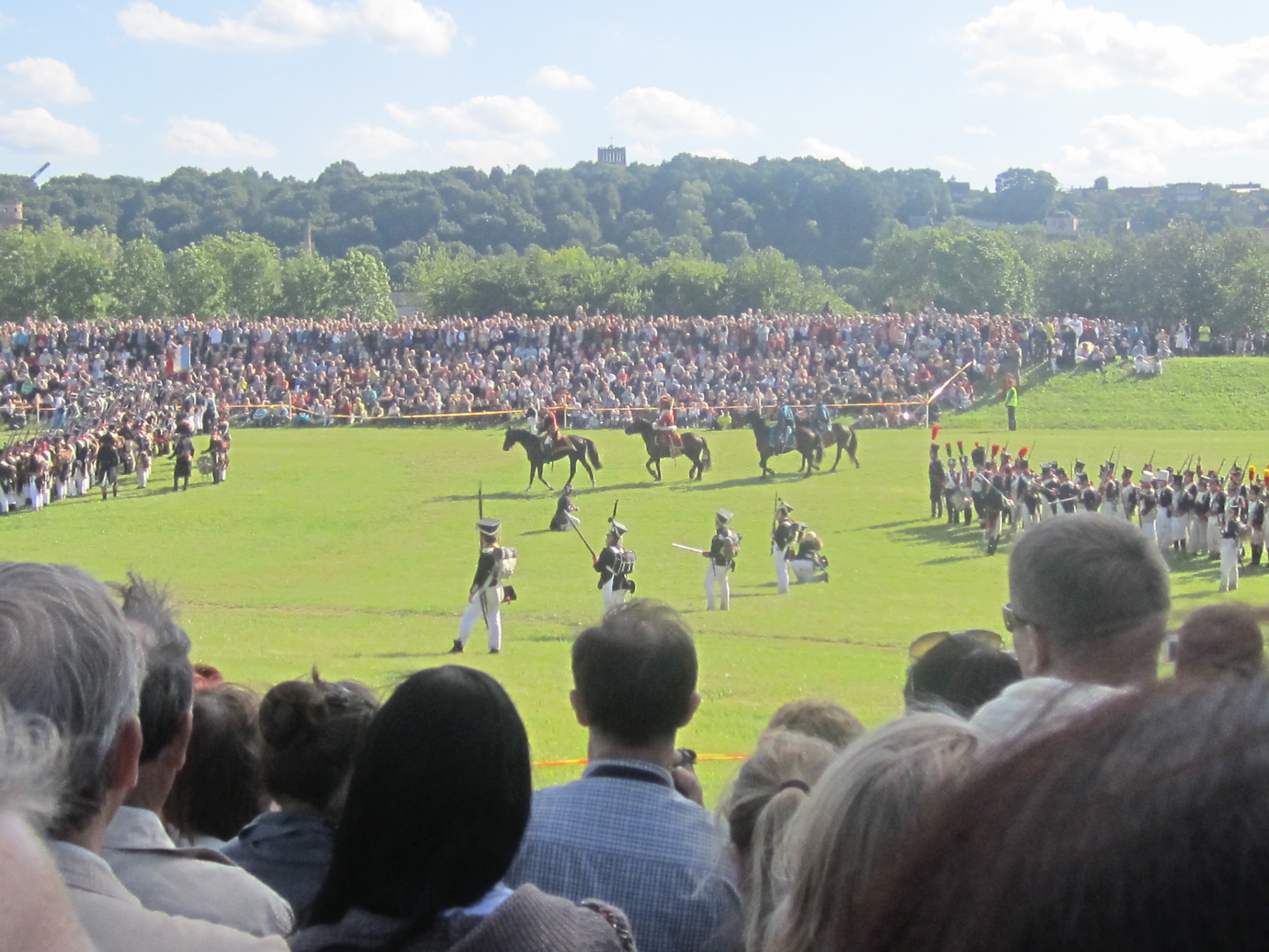 Napaleono mūšio atkūrimas